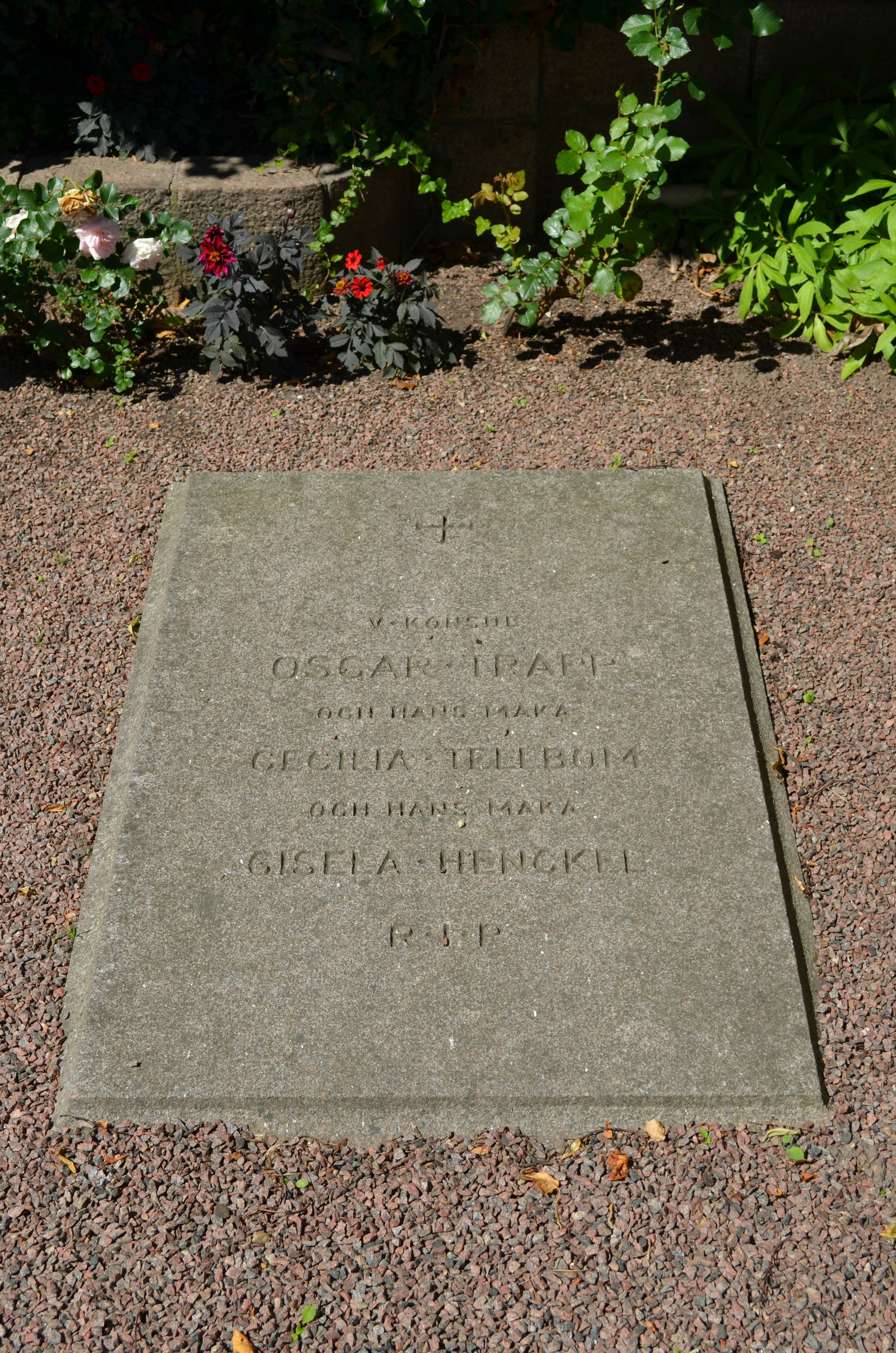 Oscar och Gisela Trapps grav på Donationskyrkogården i Helsingborg.